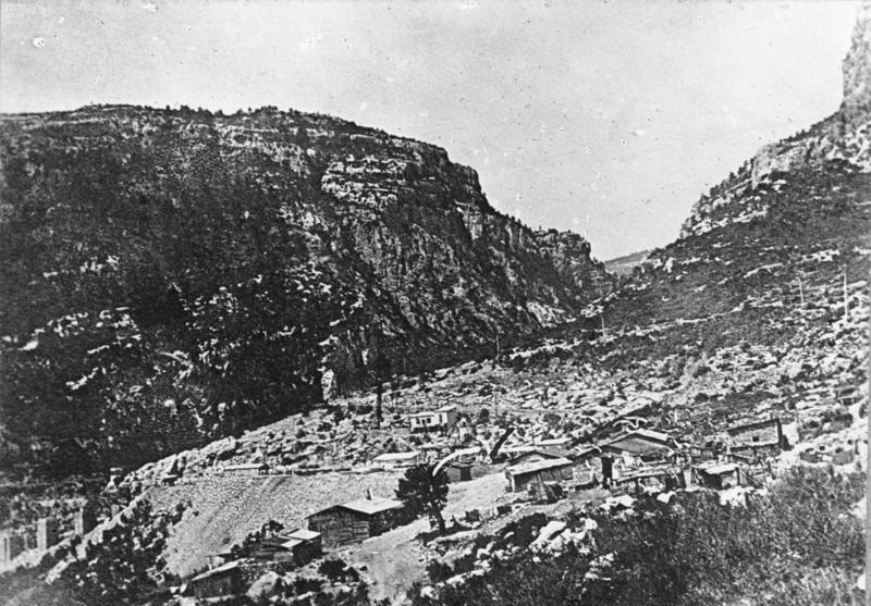 Kleinasien, Bau der Bagdadbahn Kleinasien, vom Bau der Bagdadbahn, Ortschaft und Sektion Kuschdschular. An bzw. über der "großen Schlucht" gelegen (die Schlucht, durch die die Bahn dicht neben dem Tschakyt-Fluß geleitet wurde, ist so eng, daß die Installationen für die Bauarbeiten auf die Randberge gelegt werden mußten). Information added by Wikimedia users.Baustelleneinrichtung für das Giaurdere-Viadukt, davon vier Pfeiler ganz links im Bild erkennbar.